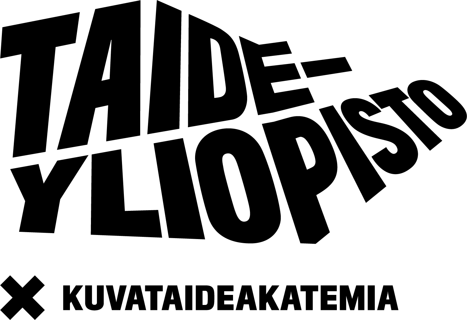 Taideyliopiston Kuvataideakatemian logo